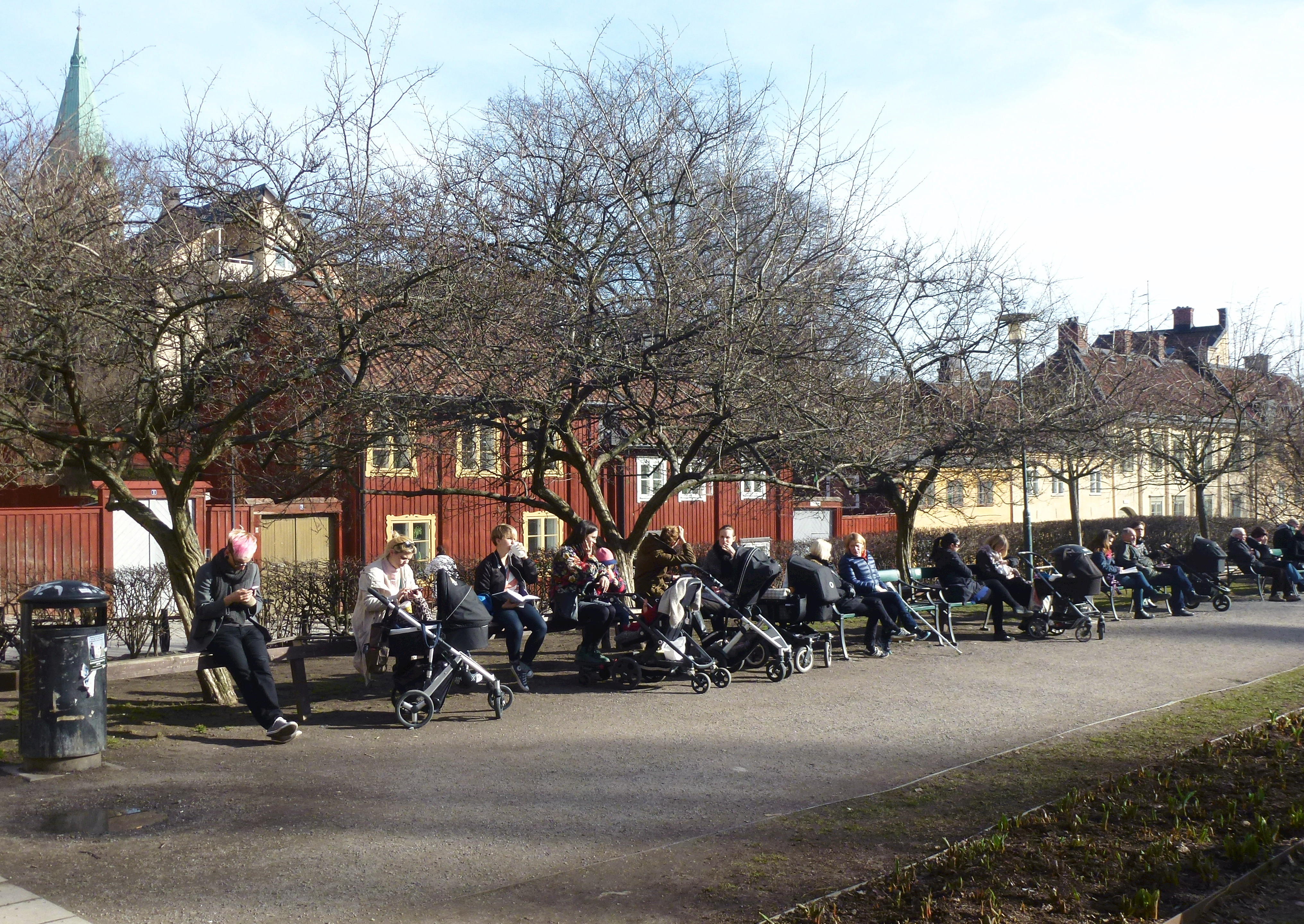 Vår på Nytorget